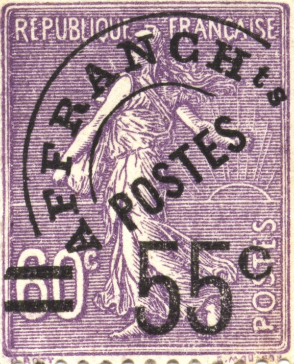 Timbre français, type Semeuse lignée, surchargé 55 c. sur 60 c. et préoblitéré